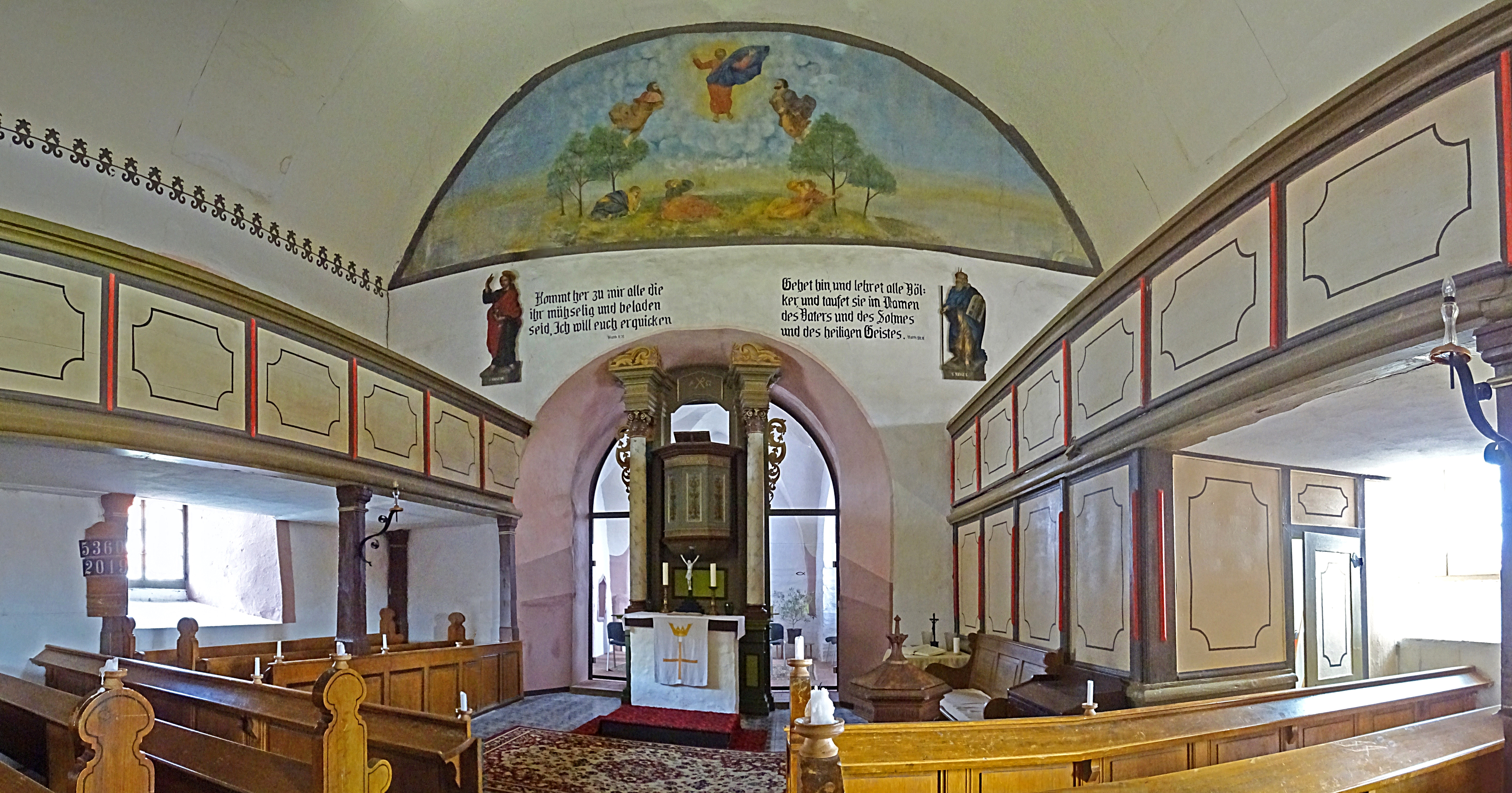 Innenraum Panorama St. Juliana Rotha. Das große Wandbild über der Kanzel zeigt die neutestamentliche Geschichte der Verklärung, als Jesus mit Mose und Elia von Angesicht zu Angesicht spricht.